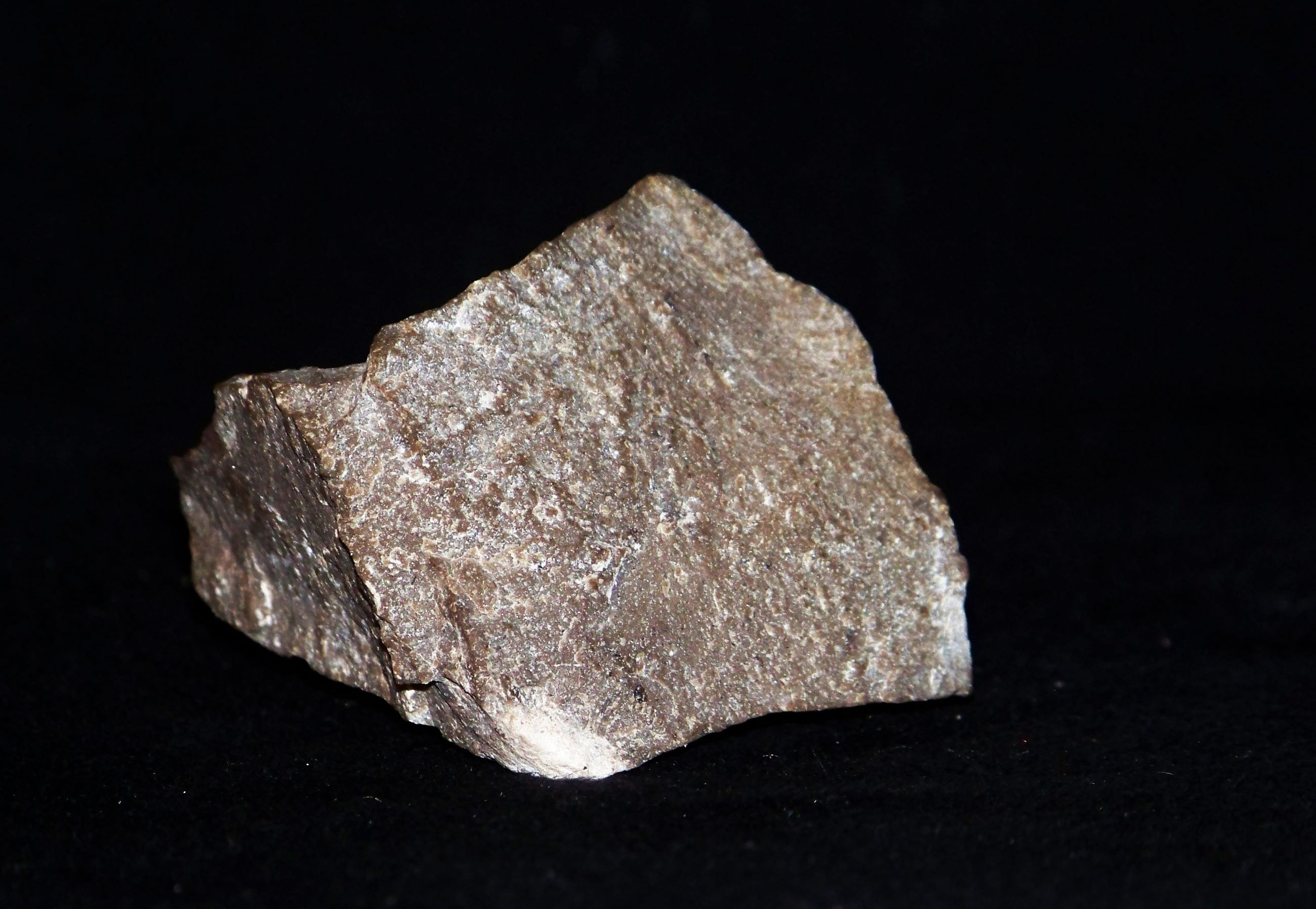 Wapień, dewon(fran), Kowala, Góry Świętokrzyskie